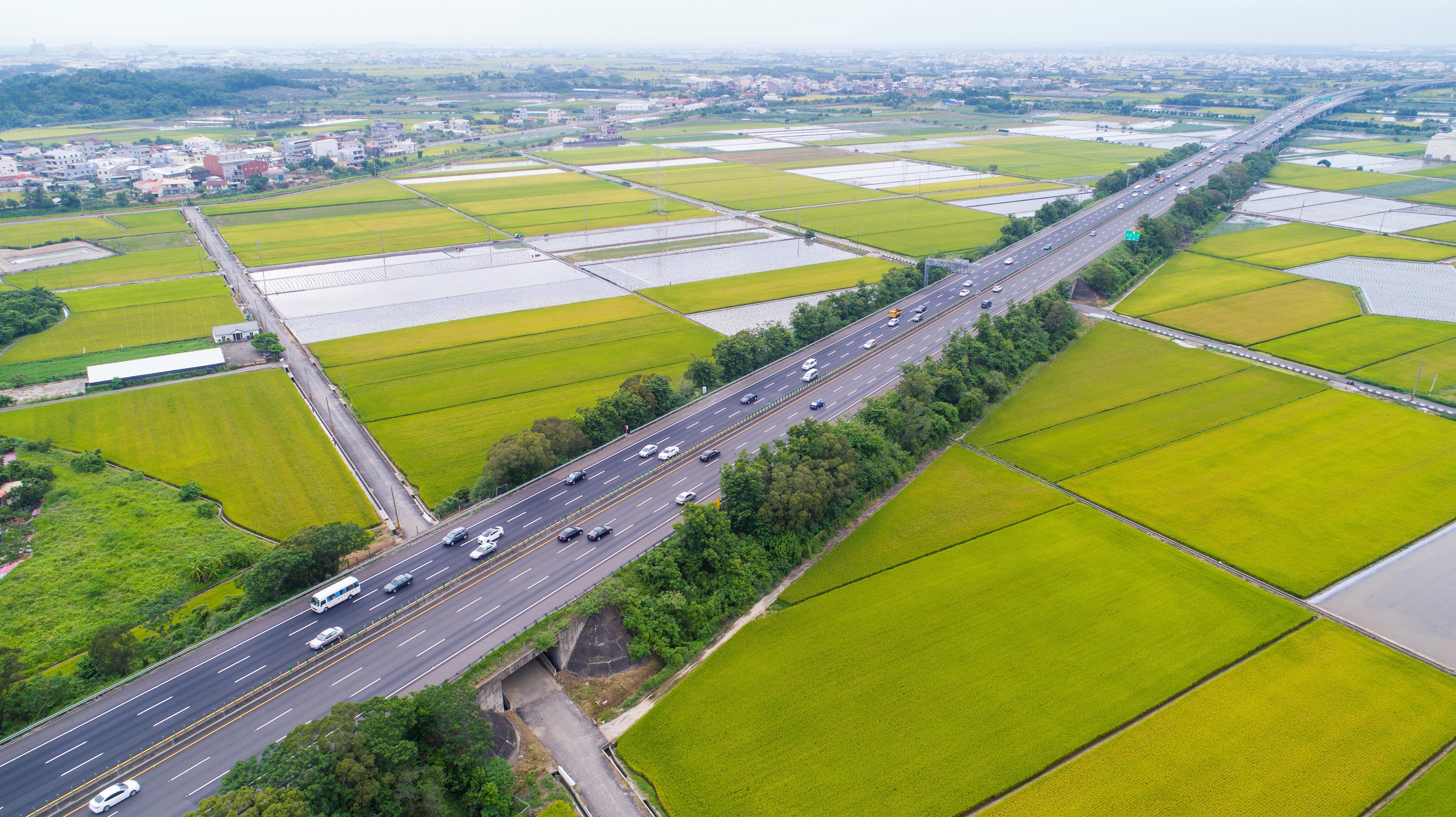 福爾摩沙公路 ( 官田區 )